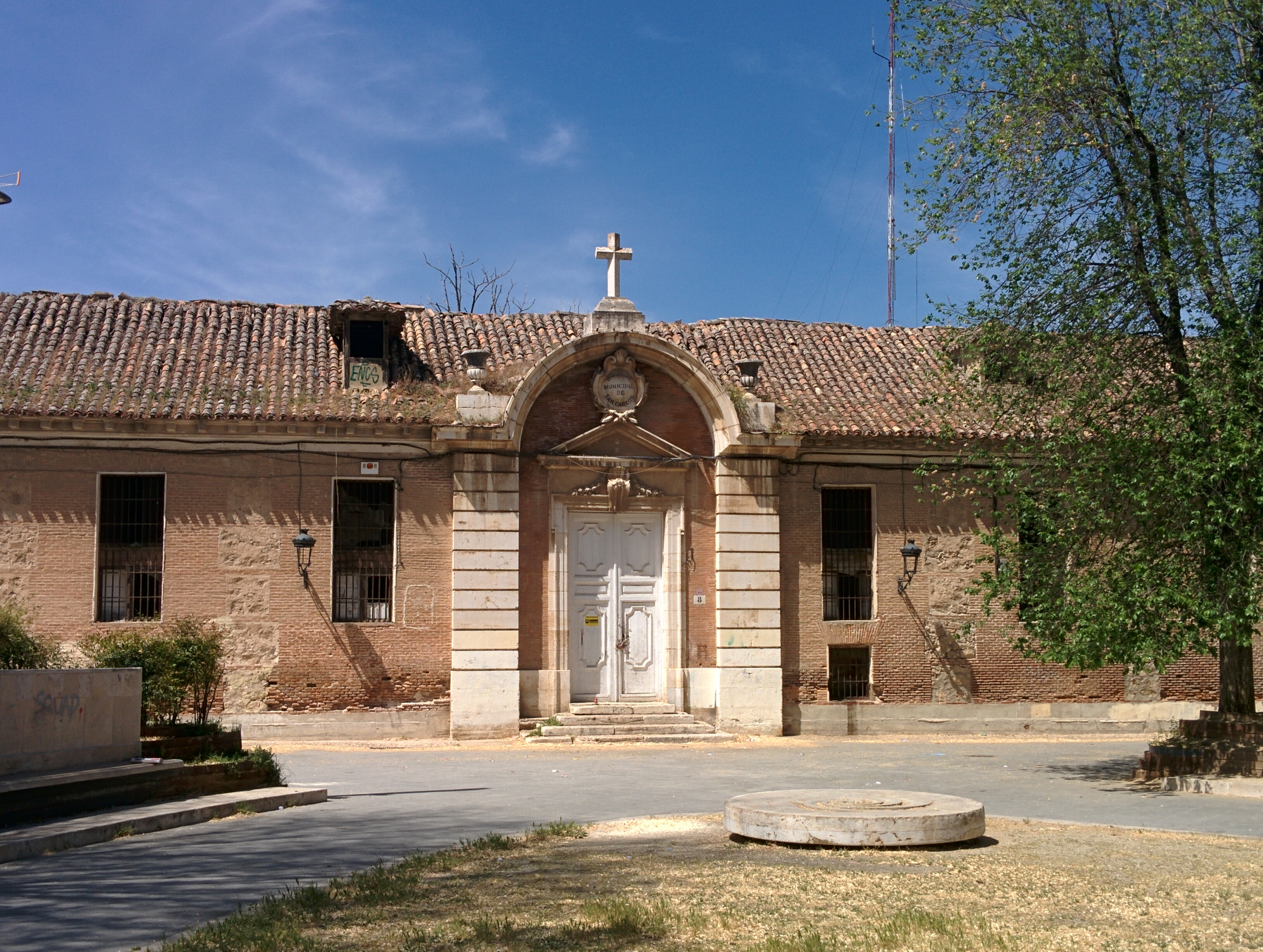 Hospital de San Carlos, en Aranjuez (Madrid, España).